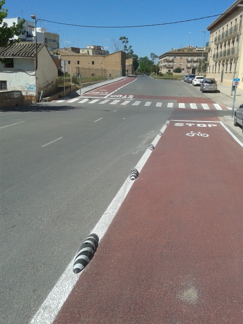 Via Xurra al seeu pas per Meliana